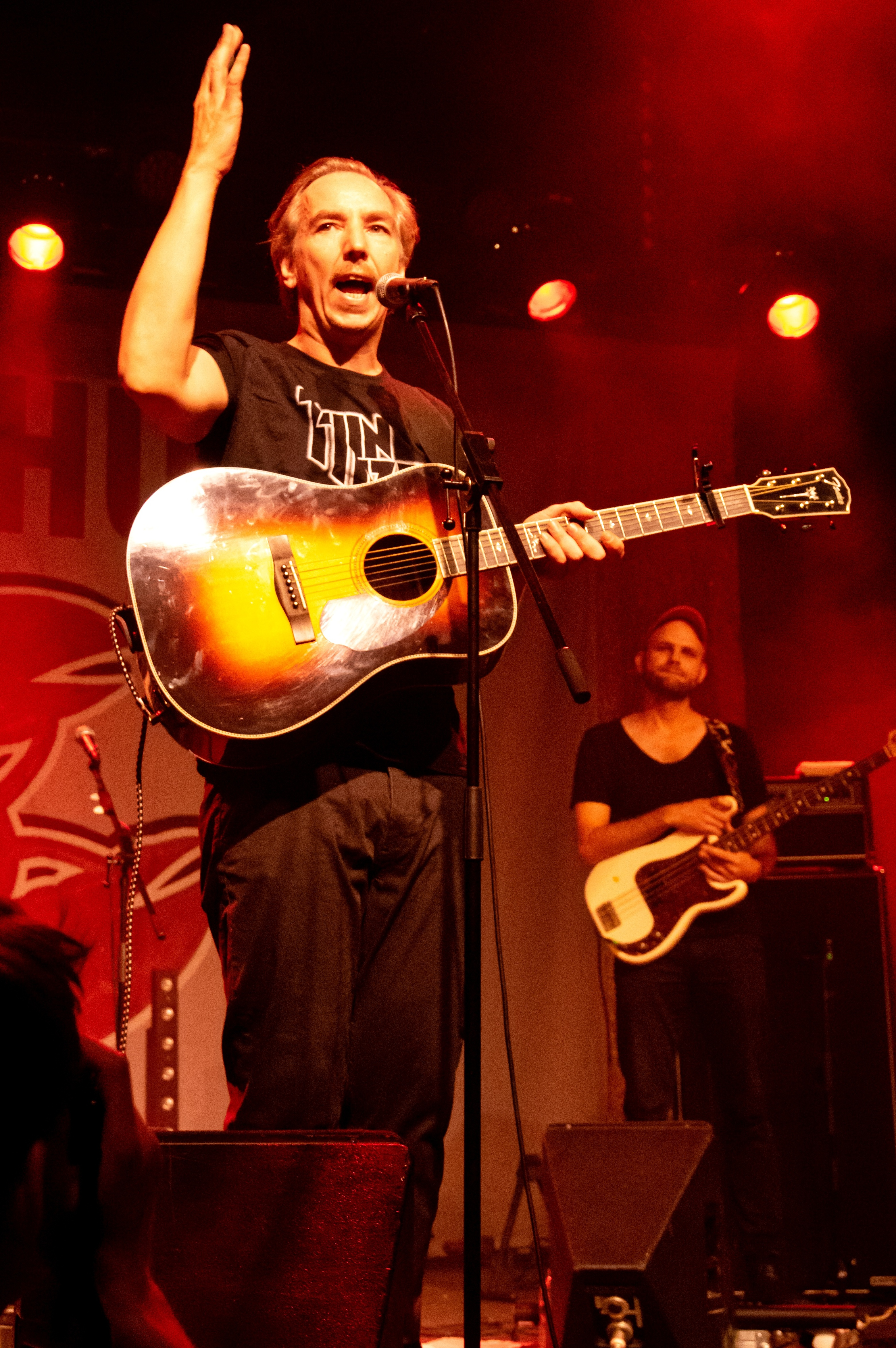 Bilder vom Zelt Musik Festival 2018 in Freiburg im Breisgau Auftritt Olli Schulz am 19. Juli 2018 im Zirkuszelt